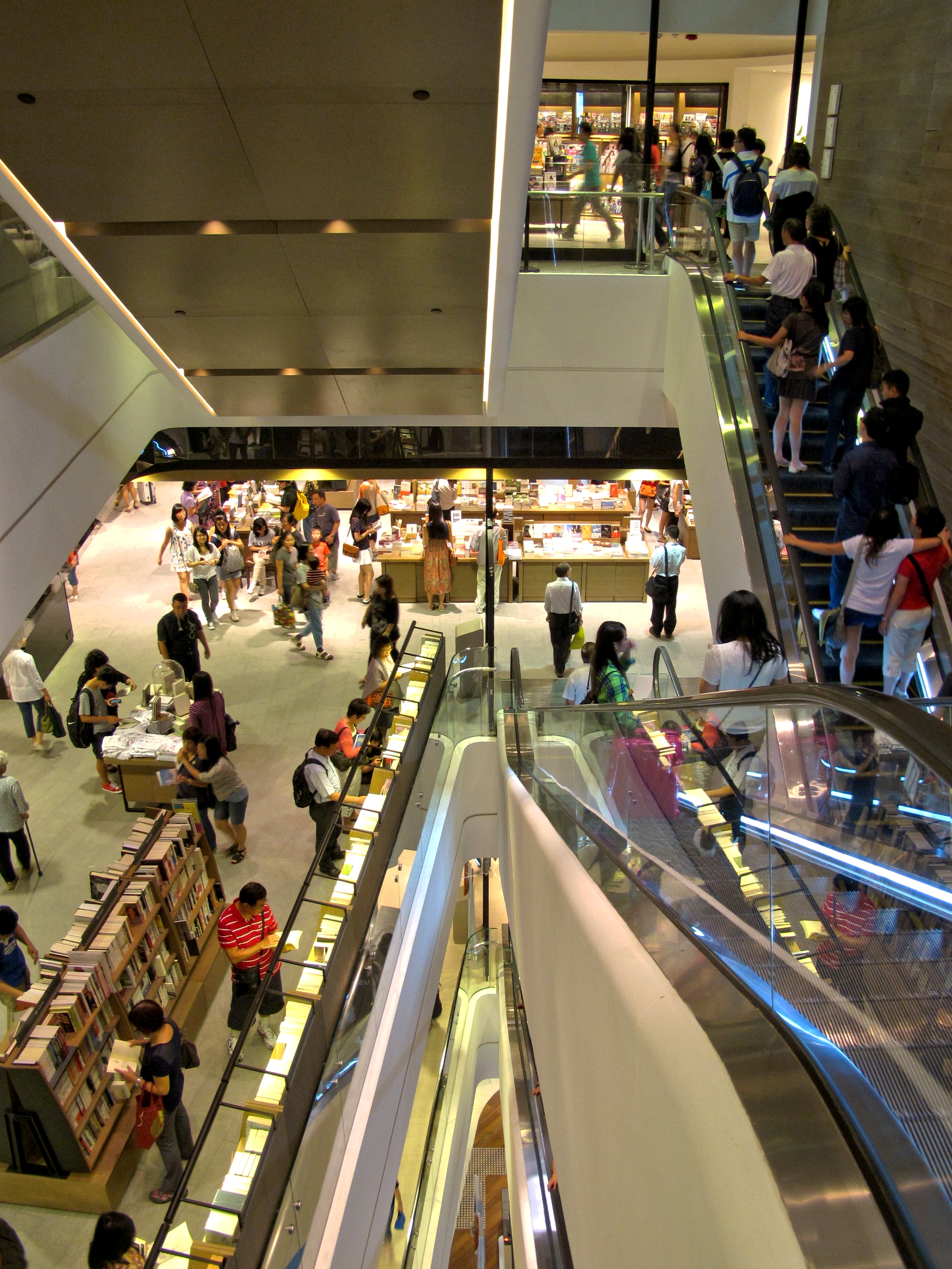 Hysan Place eslite Level 9